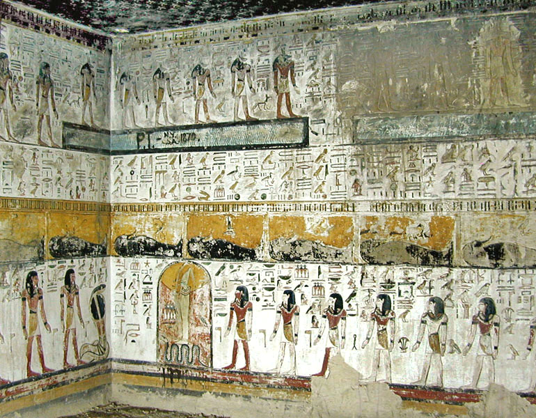 Le Livre des Portes. Séthi 1er est le 1er Roi important de l'époque Ramesside (1294-1279 av. J.C.). Il a fait construire de nombreux temples dont la grande salle hypostyle du temple d'Amon à Karnak ou le temple de millions d'années à Thèbes ouest. La tombe de Séthi 1er a été découverte par l'italien Belzoni en octobre 1817. Sa conception est totalement nouvelle. Une division est introduite entre les parties supérieures et inférieures et surtout la totalité de la tombe (100m de long) est décorée en relief peint.